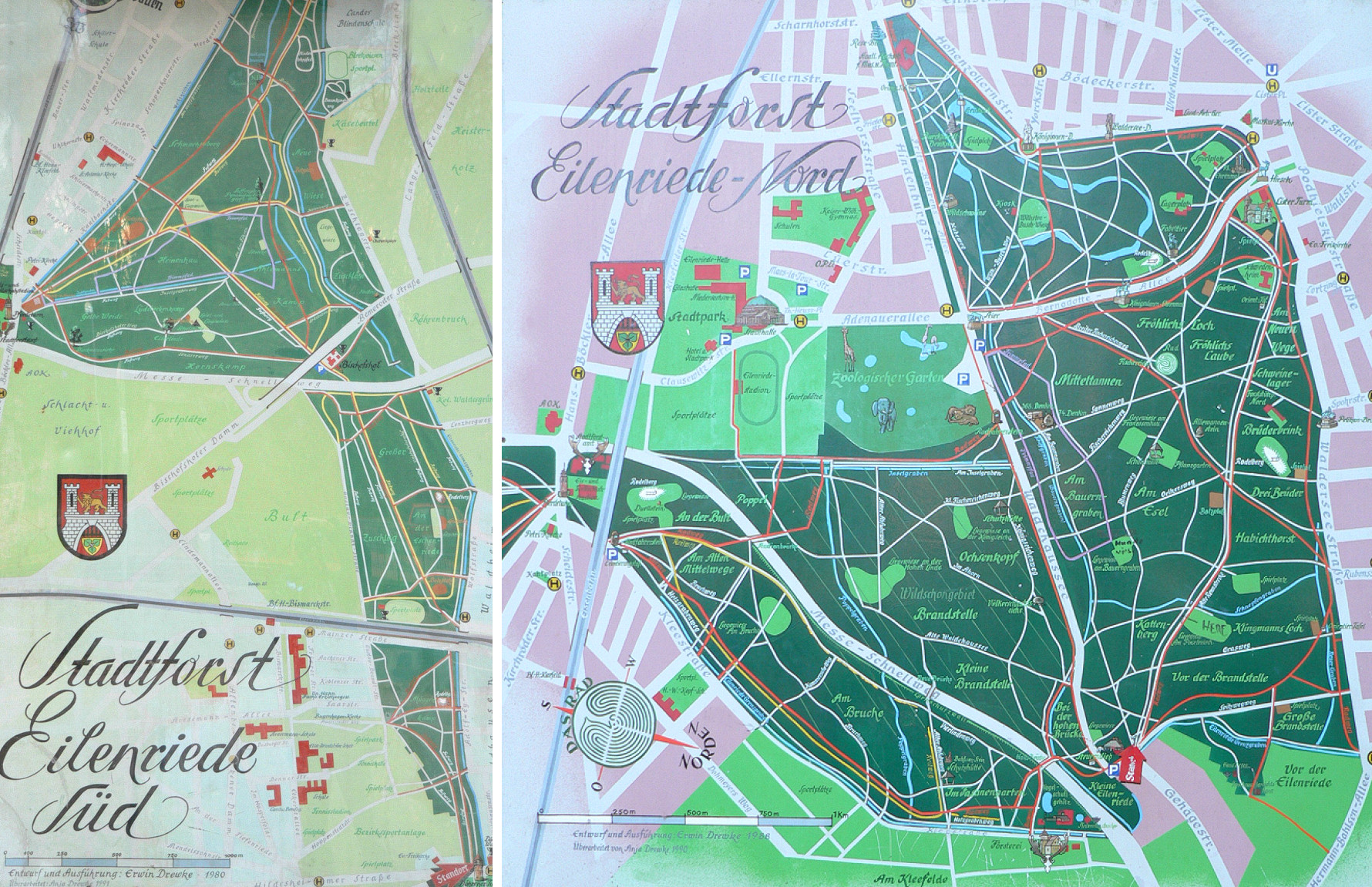 Eilenriede in Hannover Lageplan, öffentlich aufgestellt